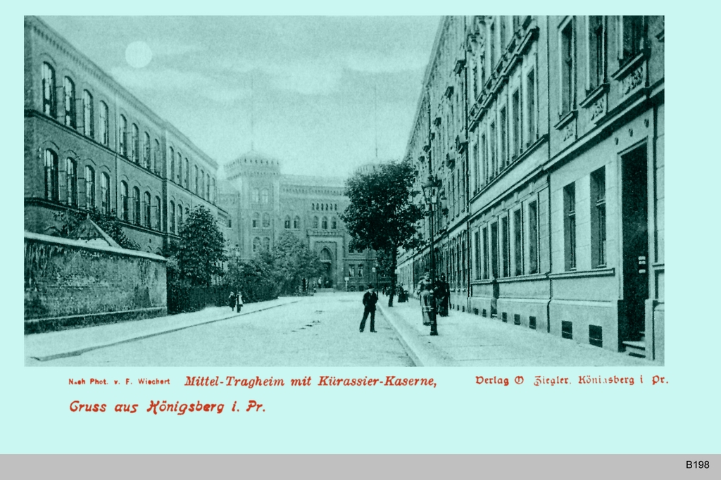 Königsberg